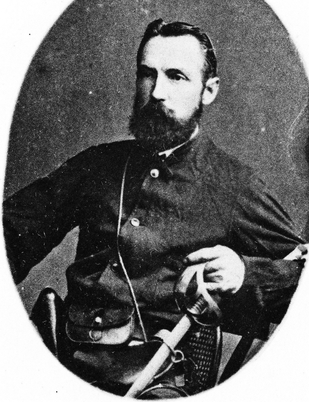 Günther von Bultzingslöwen